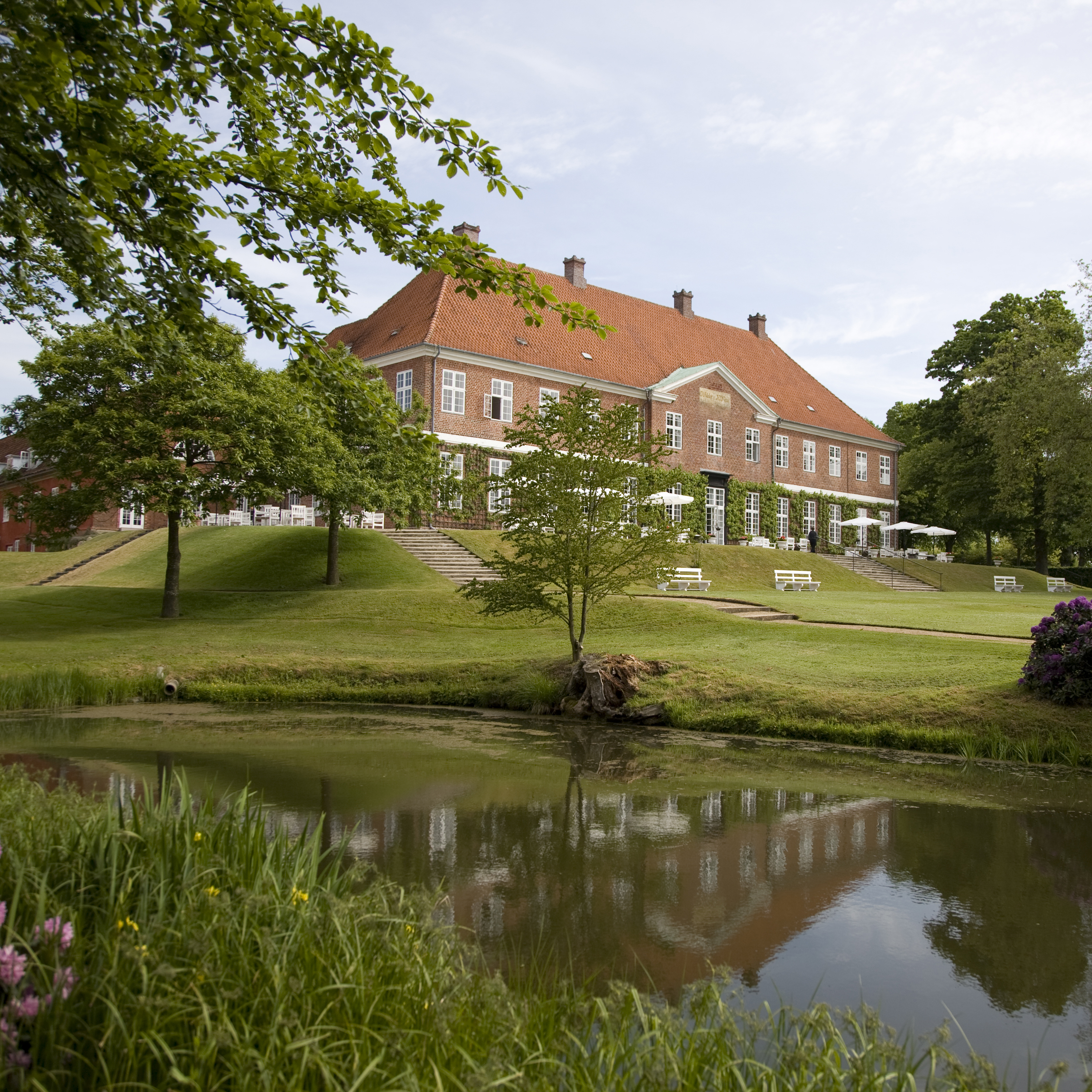 Hindsgavl